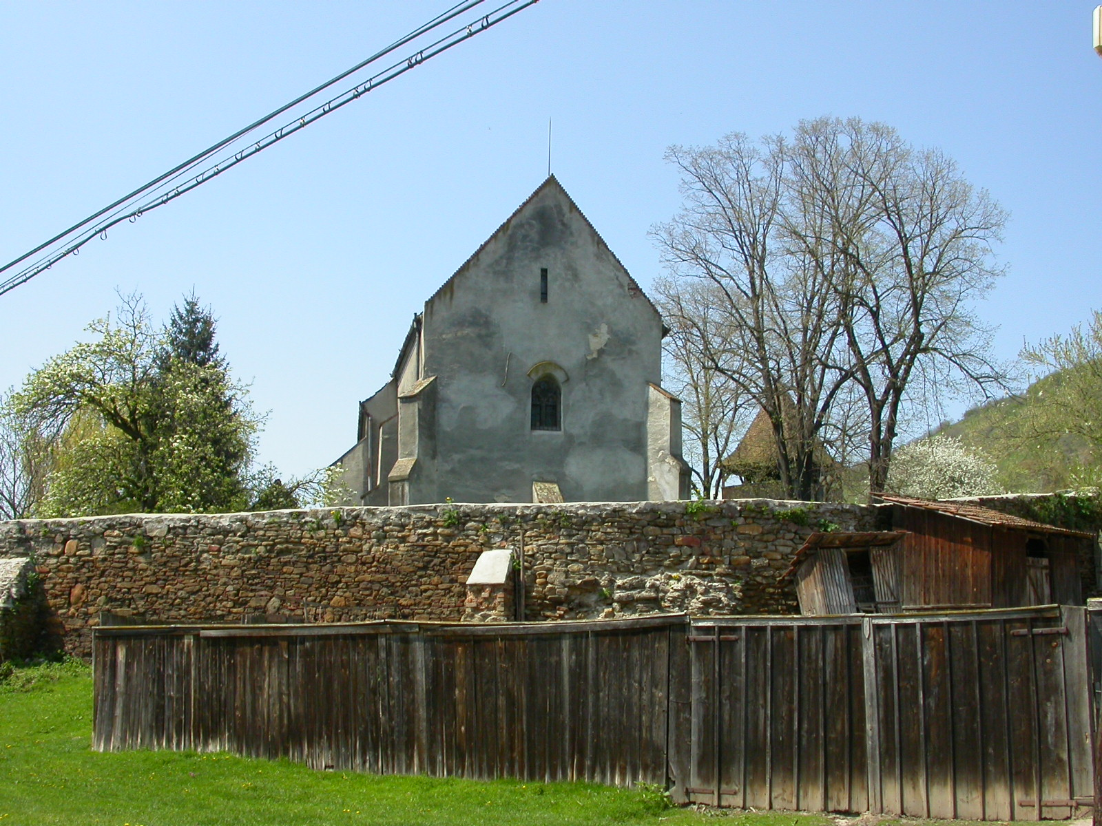 Ansamblul bisericii evanghelice, sec. XIV - XVIII